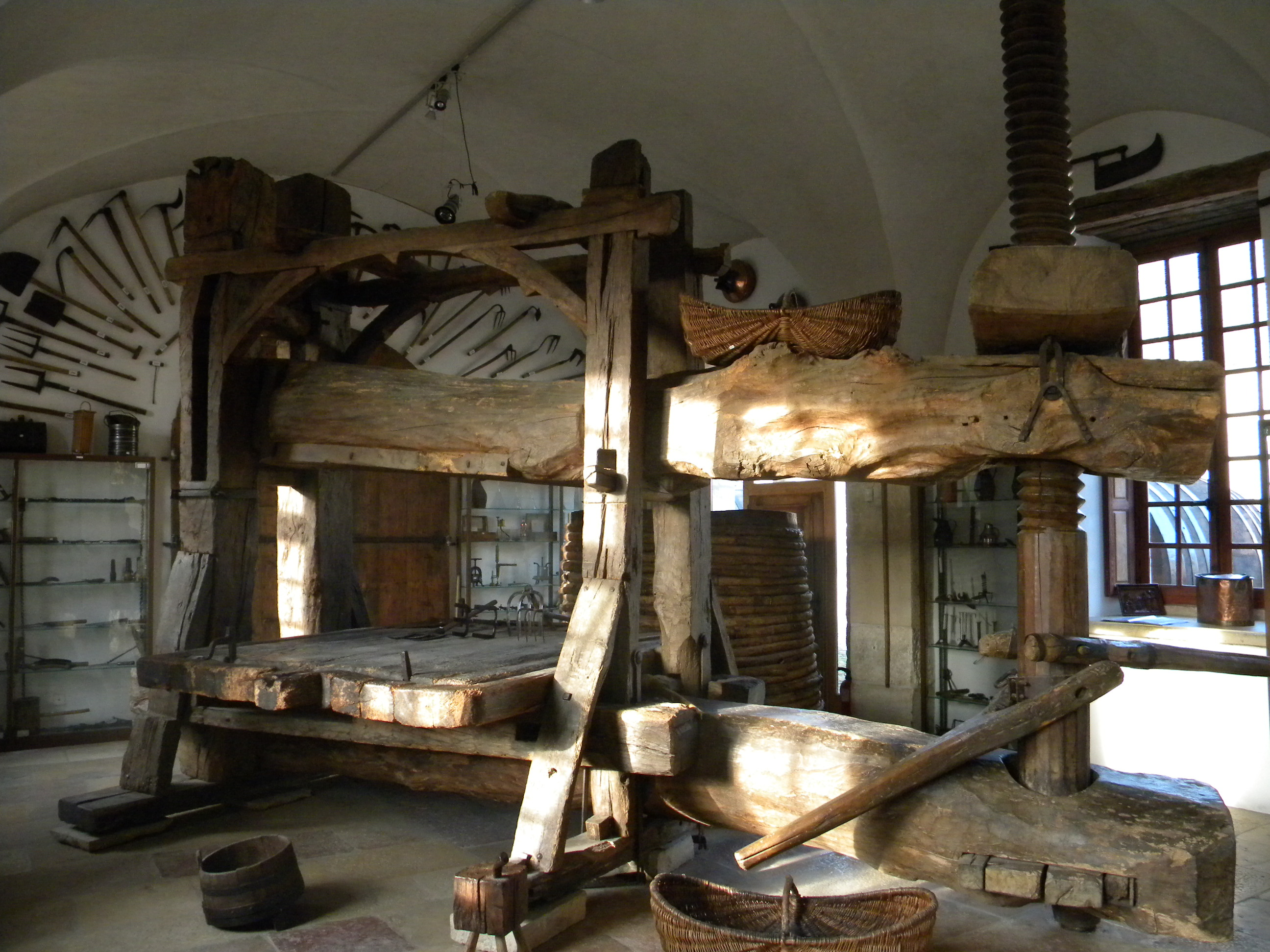 vinpremilo in kastelo de Pommard (Francio)